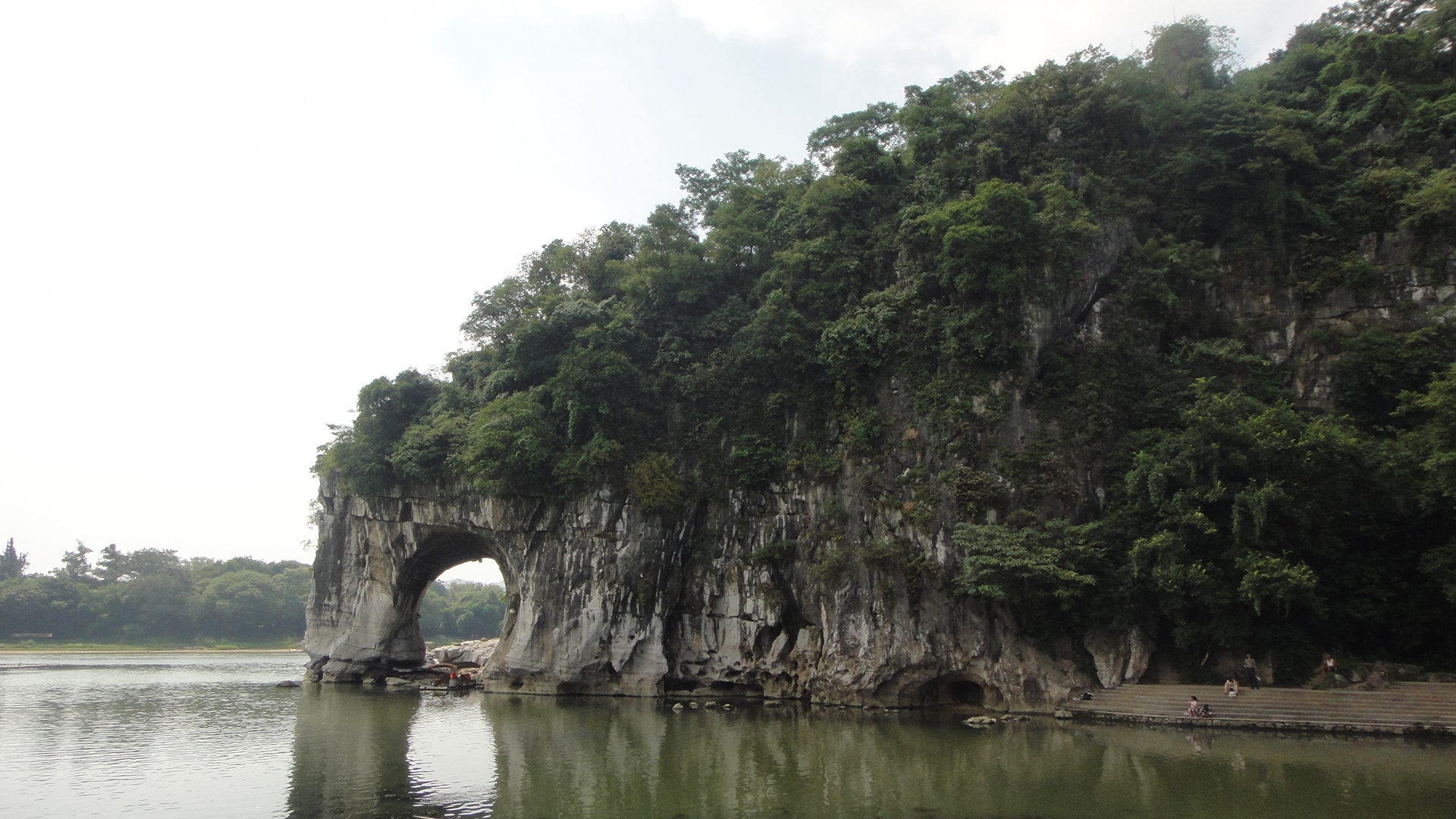 中国广西壮族自治区桂林市象鼻山